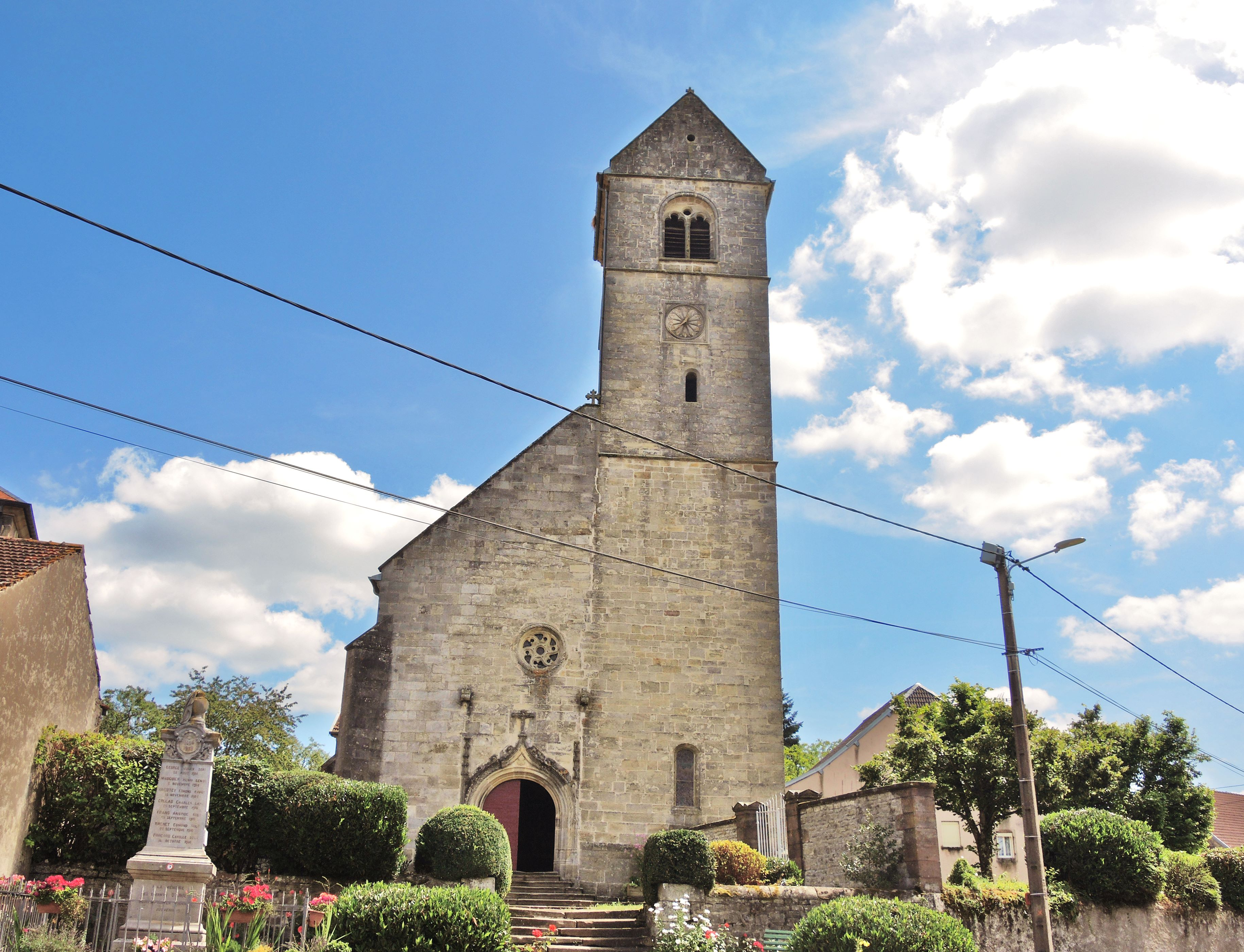 Eglise saint Rémi à Anjeux.